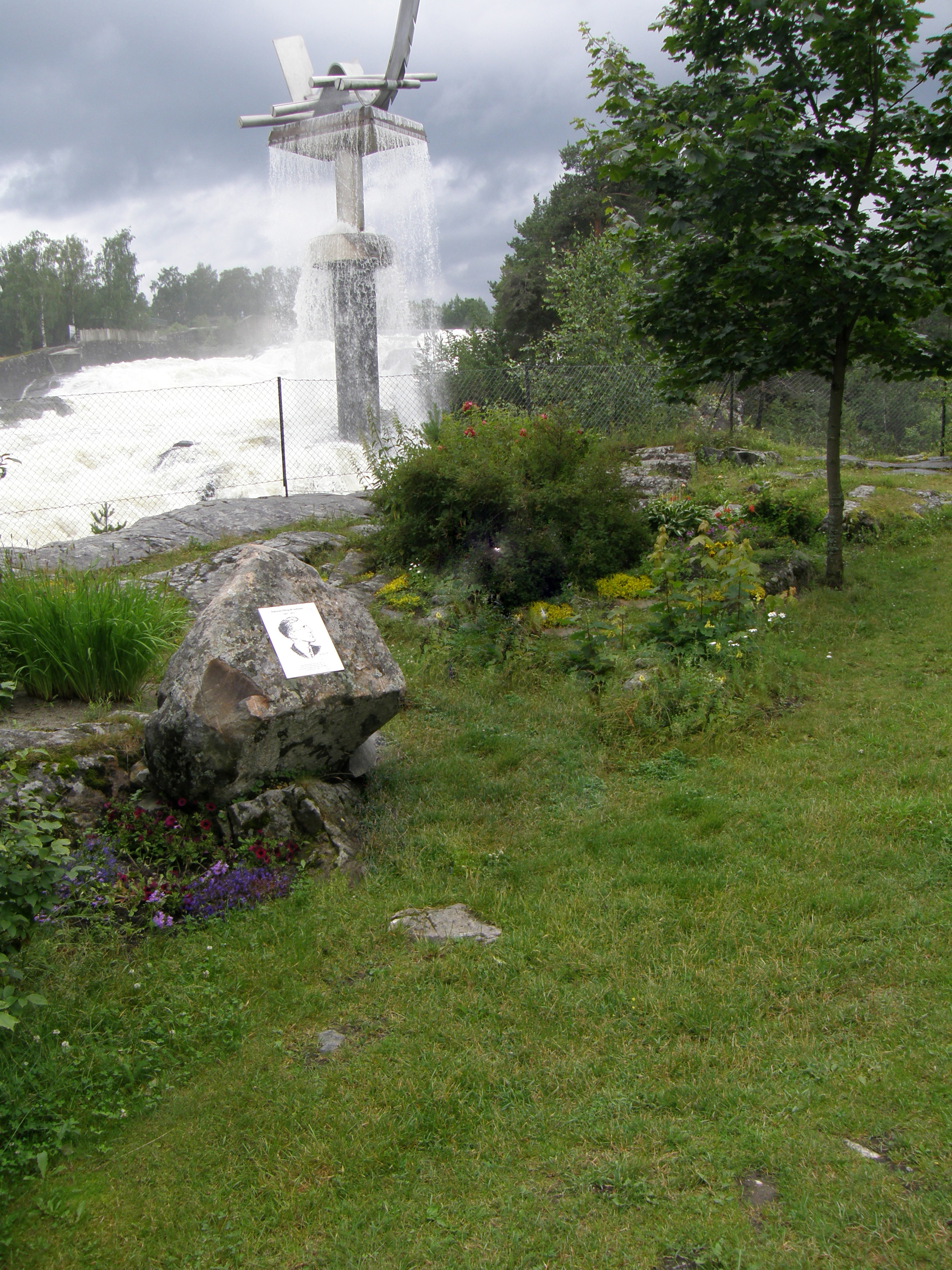 Nordre park i Hønefoss (Northern Park, Hønefoss ,Norway)